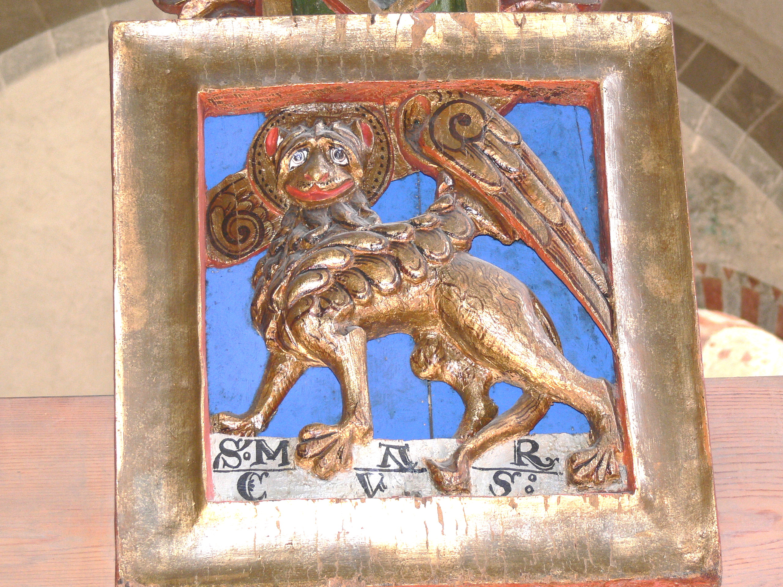 Öja Kyrka auf Gotland. Triumpfkreuz ( ca.1275 ): Evangelistensymbol Markus